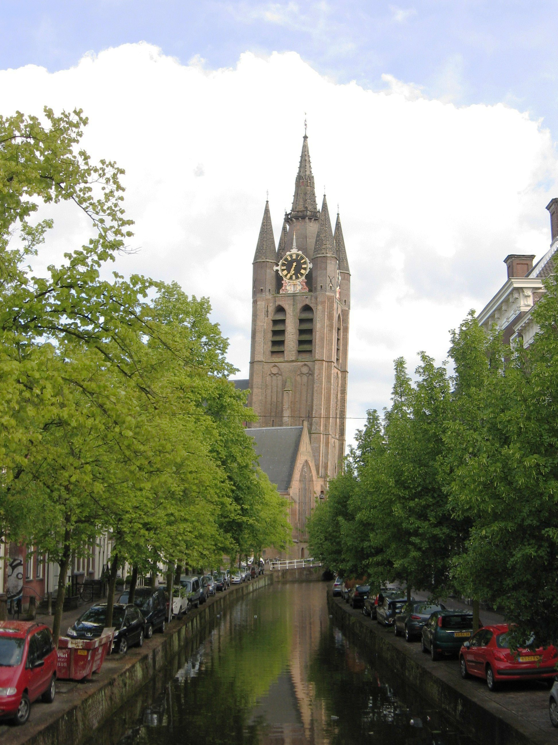 Delft - Oude Kerk.jpg, rijksmonument